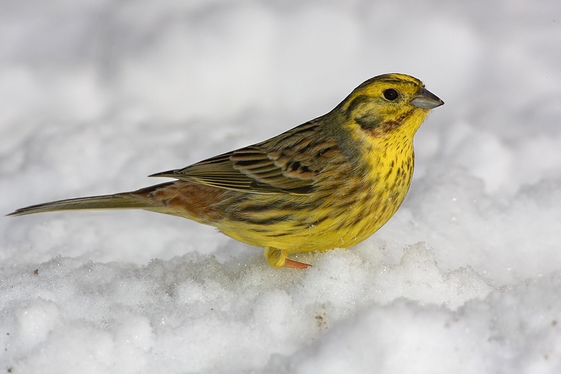 Emberiza citrinella, Litovelské pomoraví, CZ